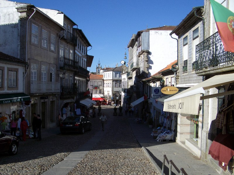 Valença_-_Rua_C_Lopes_da_Silva.jpg